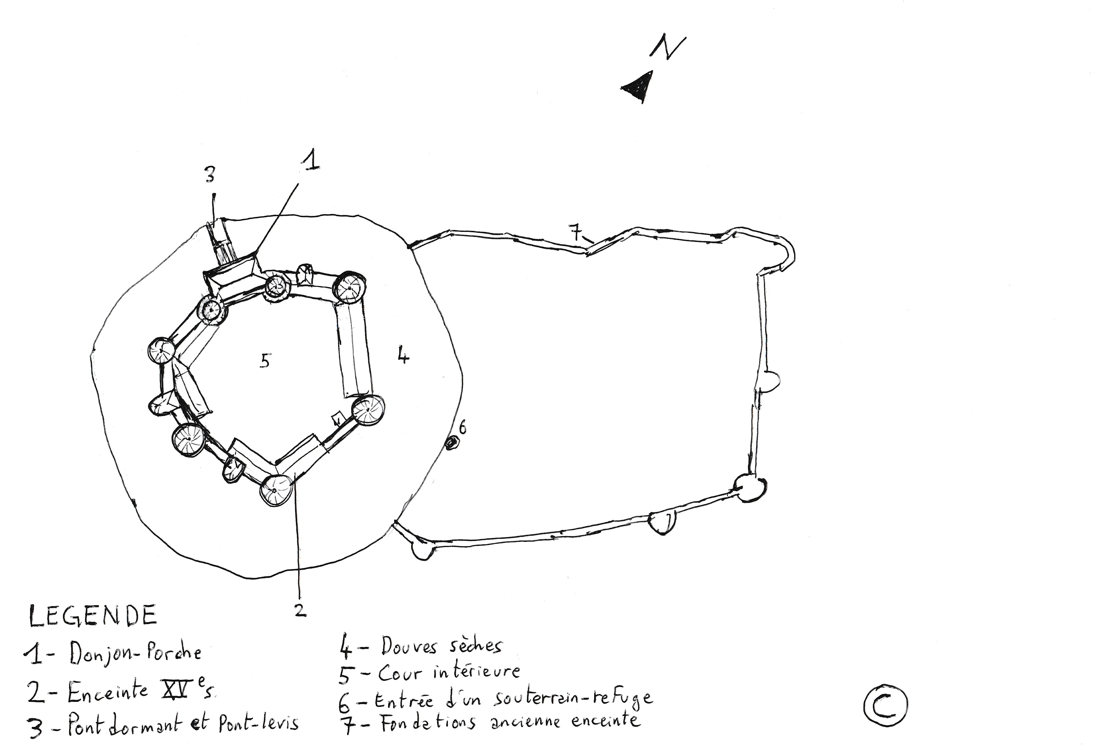 Plan du château fort de Sigournais au XVe siècle et de l'ancienne enceinte.